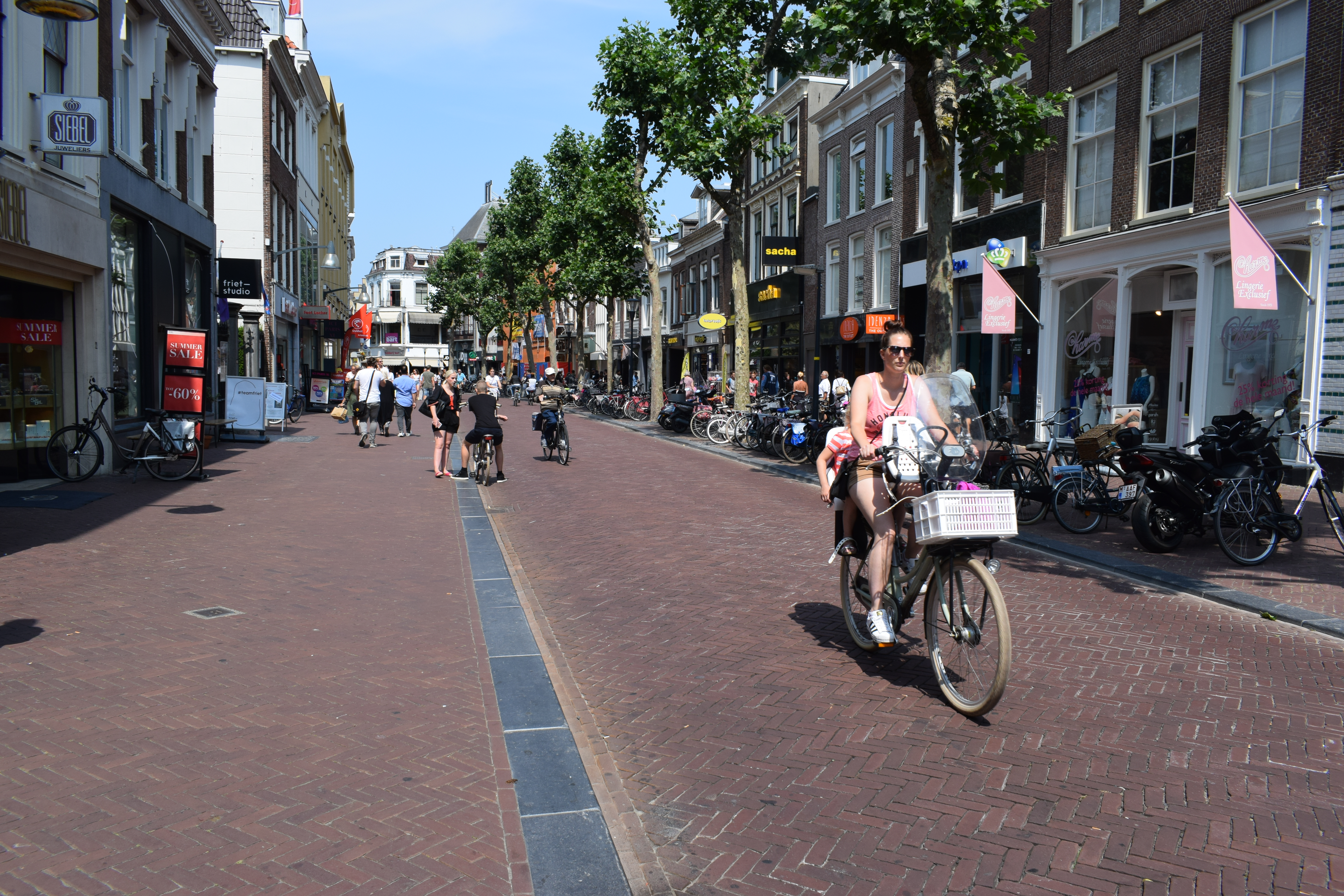 Vue de Leeuwarden en Frise (Pays-Bas).